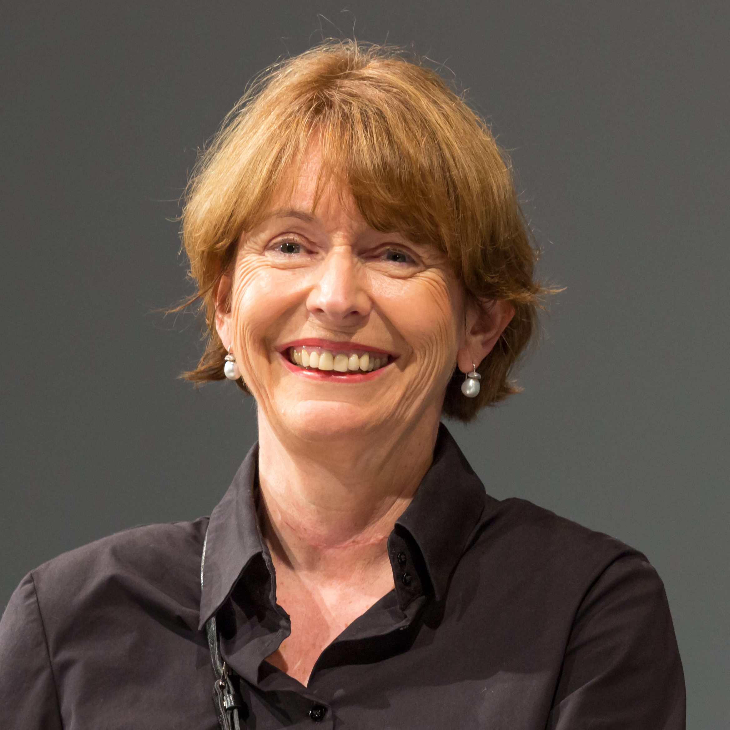 Birlikte 2016: Dialogmarathon - Nicht Anderen beim Reden zuschauen, sondern Mitreden! - 15:00 Uhr: Wem gehört die Stadt? – Wer gestaltet die Stadt? Teilnehmer: Henriette Reker, Oberbürgermeisterin der Stadt Köln und Claus Leggewie, Politikwissenschaftler, Direktor des Kulturwissenschaftlichen Instituts Essen (KWI) Moderation: Jürgen Wiebicke und Thomas LaueVeranstaltungsort: Depot 1 Schauspiel Köln/Carlswerk Foto: Henriette Reker, Oberbürgermeisterin